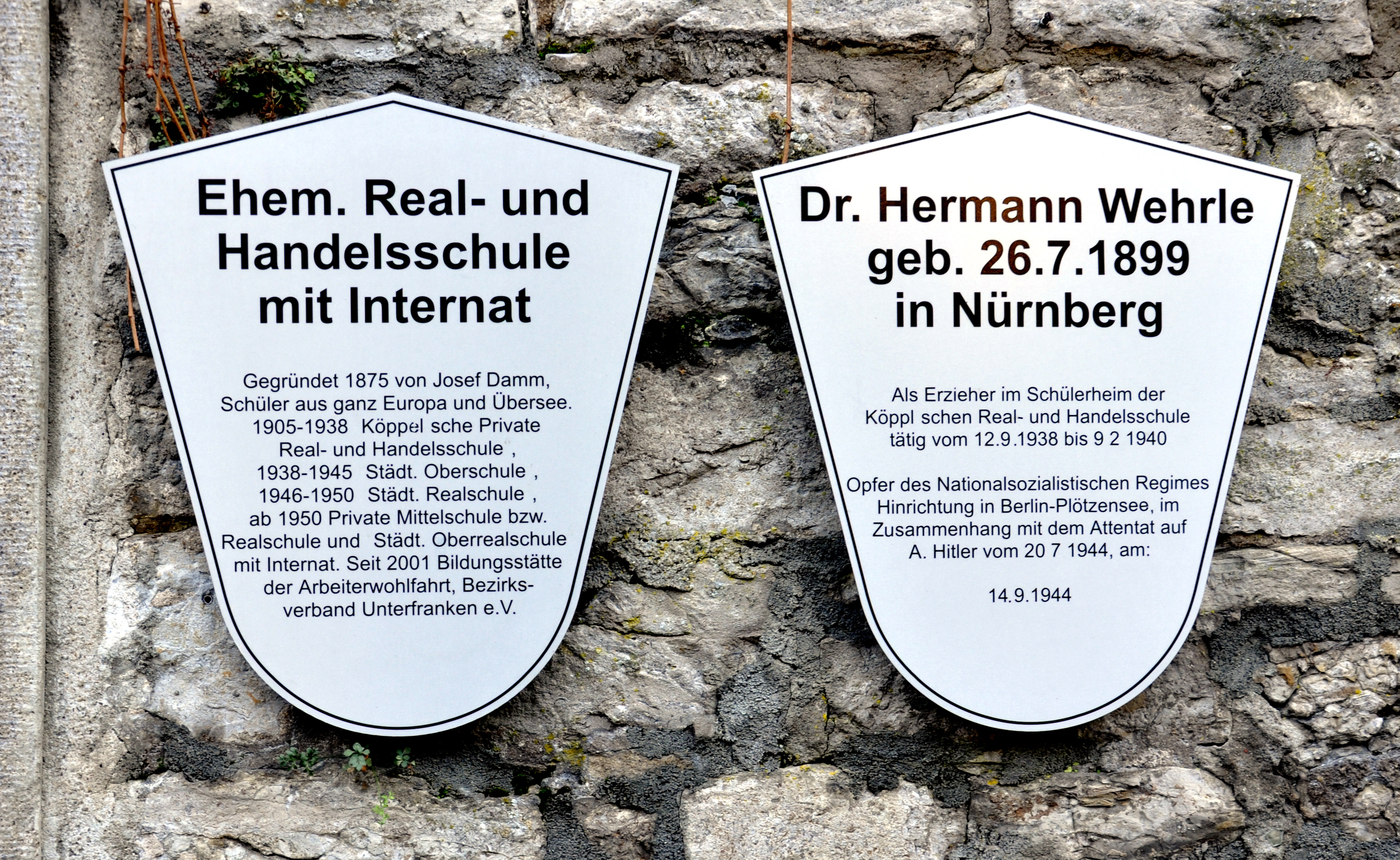 Marktbreit, ehemalige Realschule mit Internat, heute AWO-Bildungsstätte; Informationstafel und Gedenktafel an Hermann Wehrle